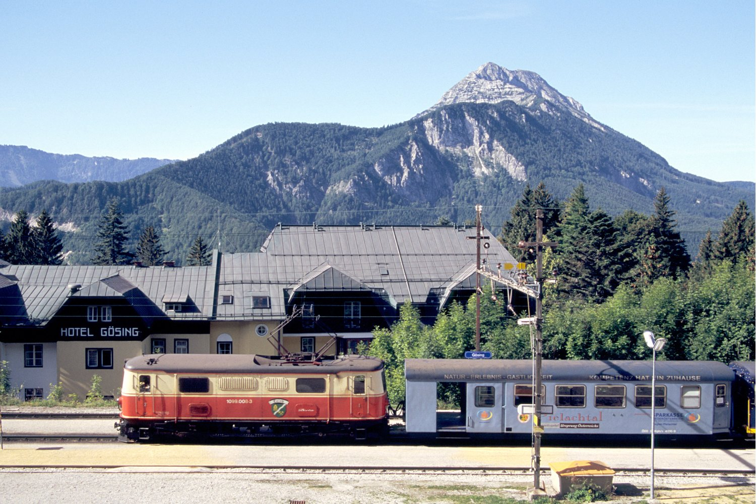 de: Zug der Mariazellerbahn im Bahnhof Gösing vor der Kulisse des Ötschers. en: A train of the Mariazellerbahn in Gösing station with Ötscher mountain.